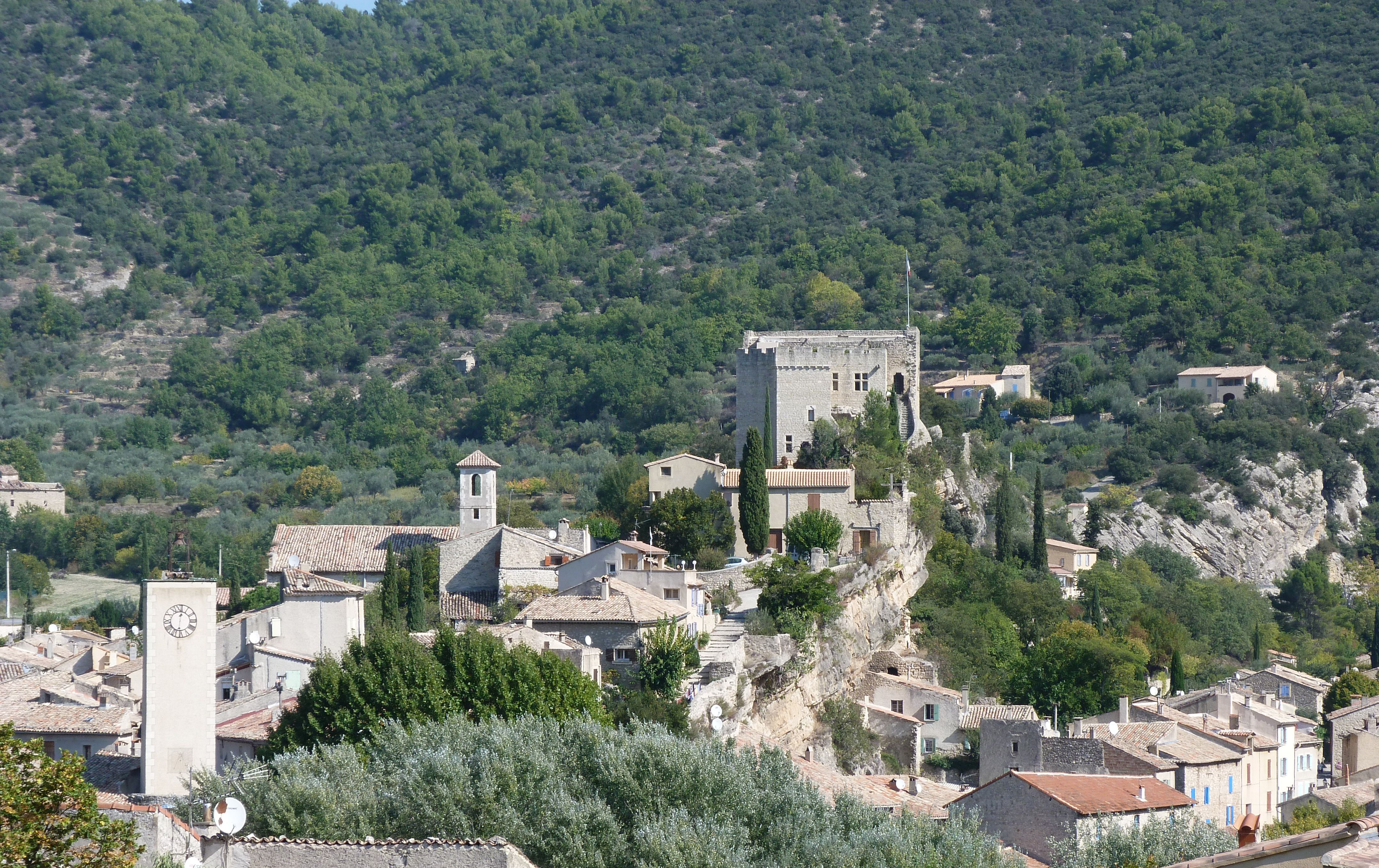 Le village de Mollans-sur-Ouvèze (Drôme), vu du Sud